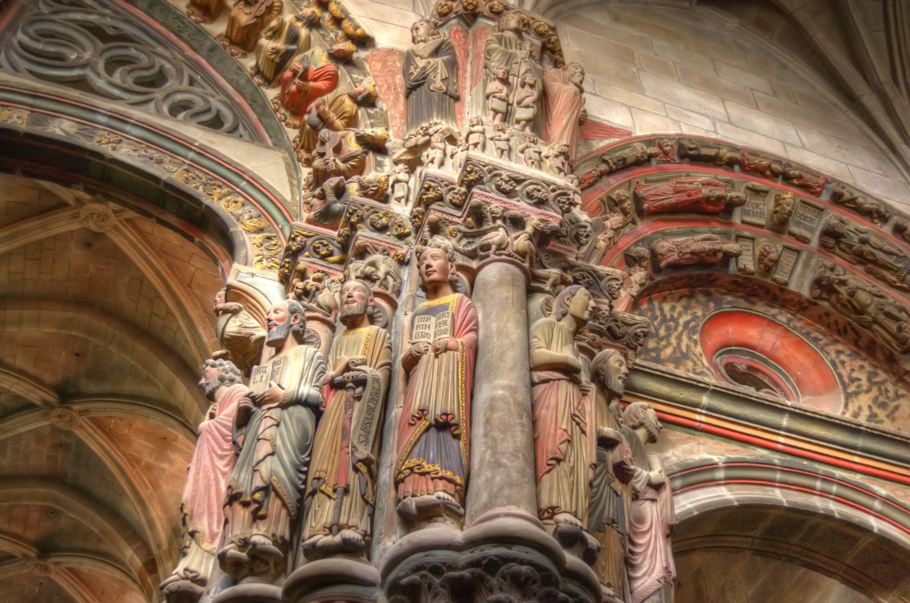 Catedral de Orense, detalle del interior. (España - Spain) 2009